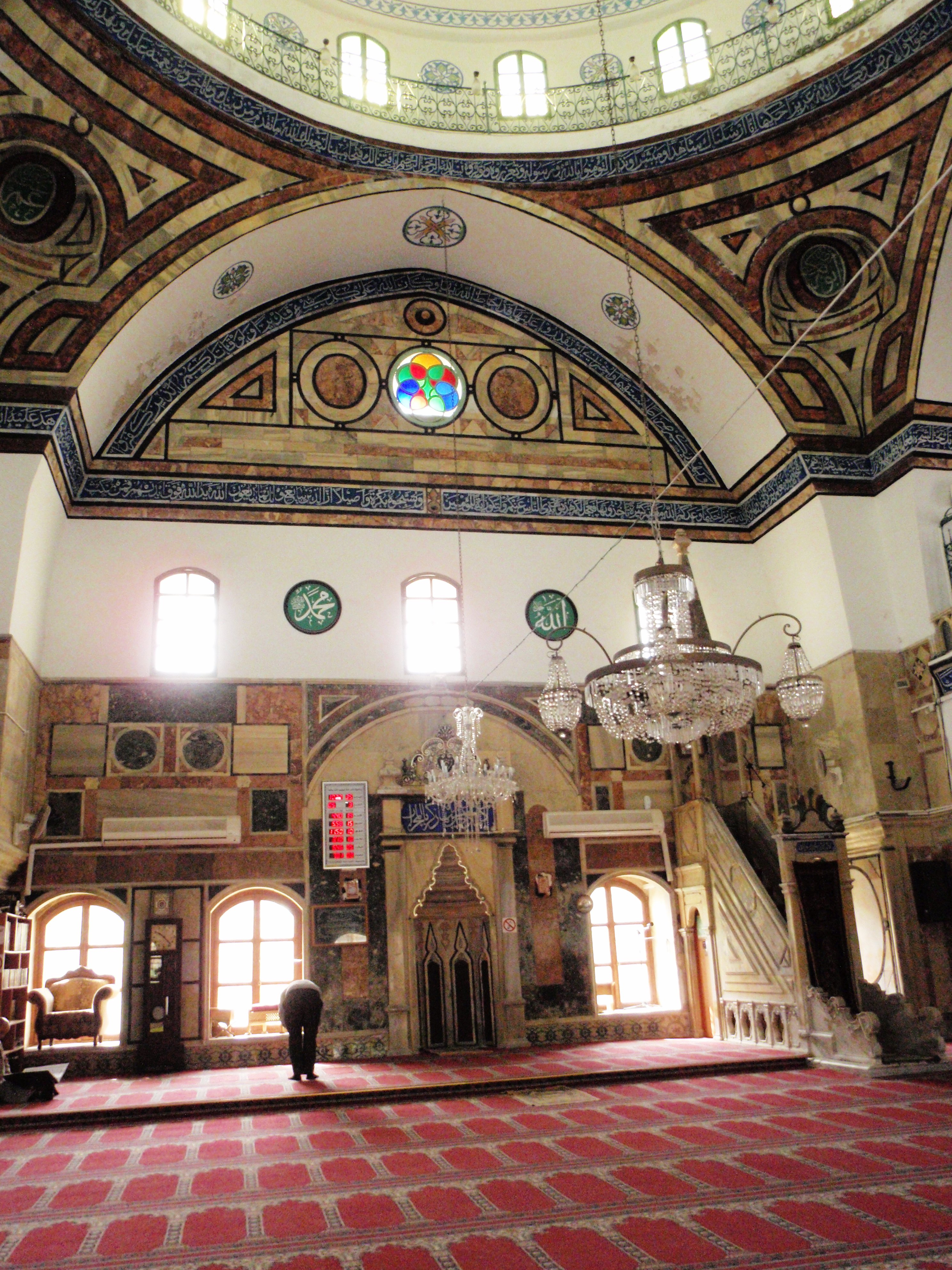 סיור בעכו Mosque of Al-Gazar